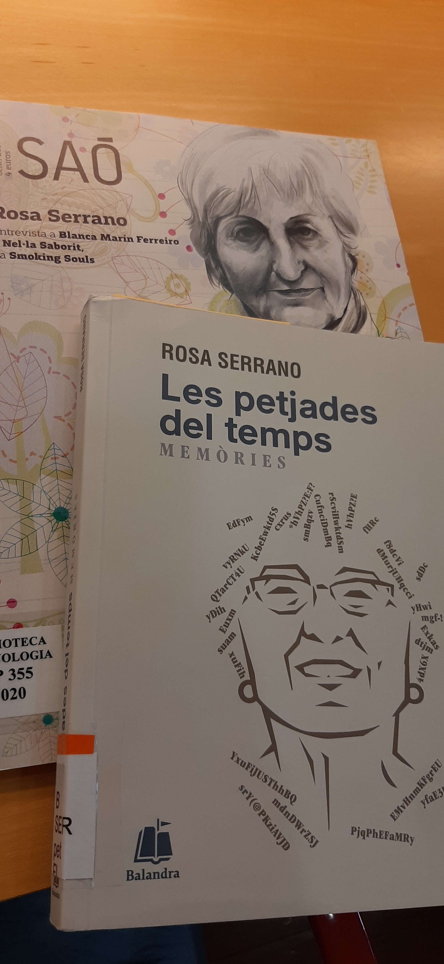 Bibliografia sobre l'editora Rosa Serrano